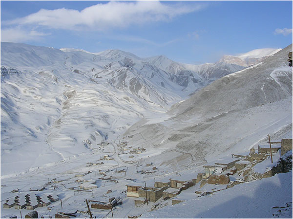 Xınalıq Village in Azerbaijan